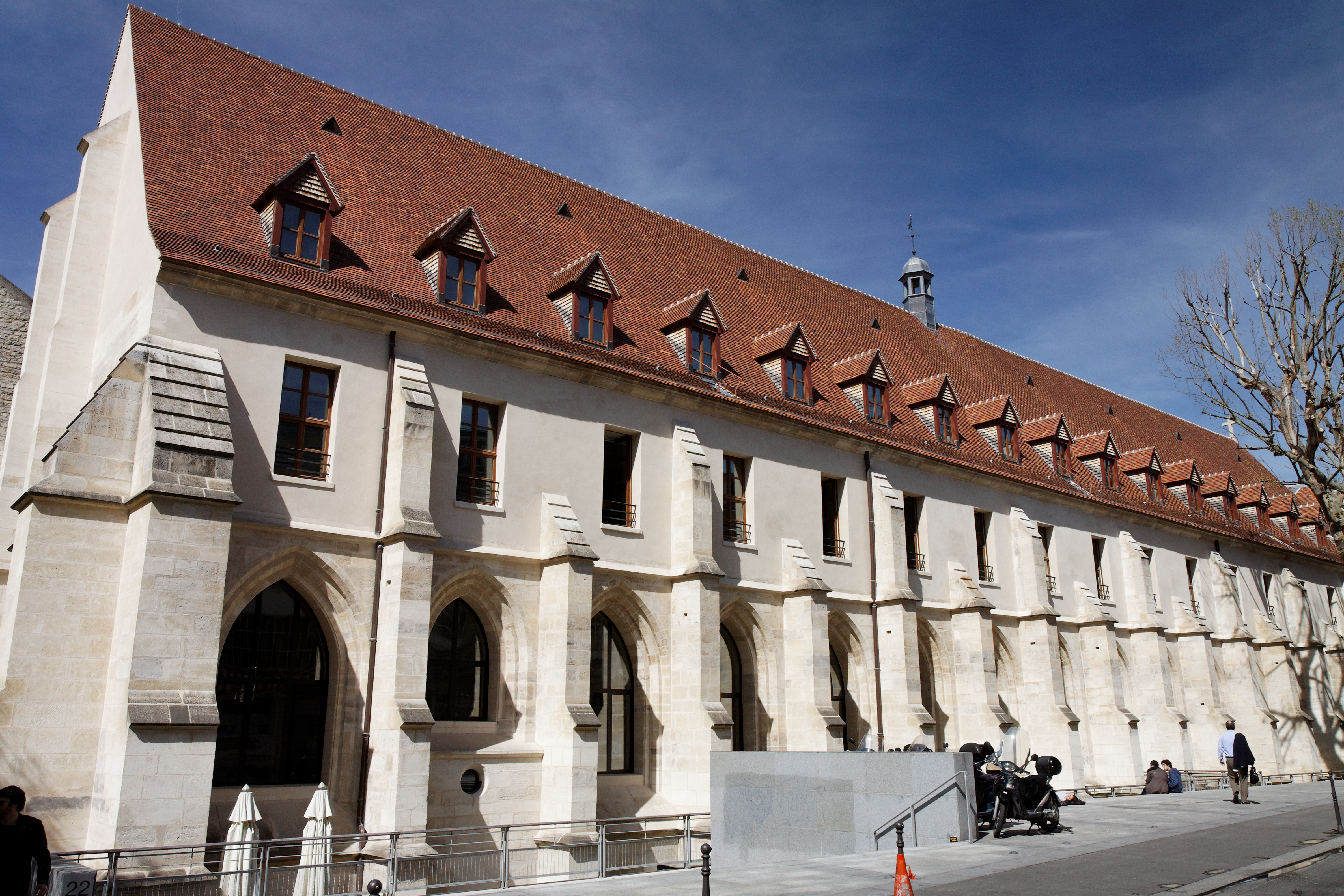 Photographie prise au collège des Bernardins suite à l'invitation de ce dernier pour que des photographes de Wikimédia France viennent effectuer un reportage photographique.